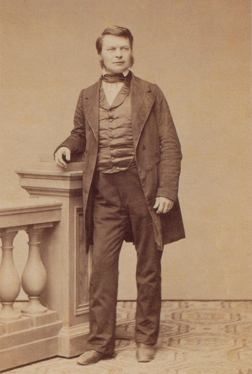 Eduard Eyth, um 1850/1860, Literarisches Museum im Max-Eyth-Haus, Kirchheim unter Teck.